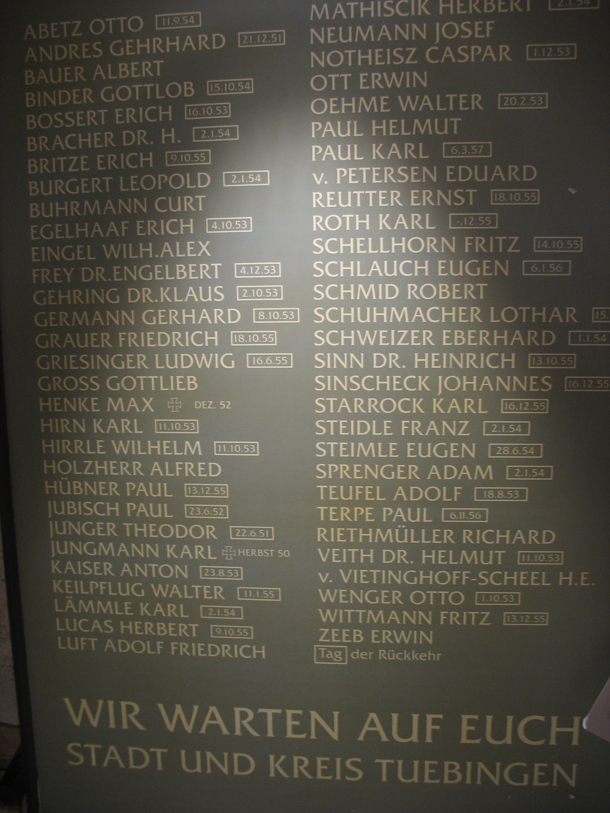 Die Stadt Tübingen brachte am Tübinger Holzmarkt 1951 eine Tafel für Kriegsgefangene an, darunter auch die Namen der verurteilten Kriegsverbrecher Otto Abetz und Eugen Steimle. Die Tafel wurde 2003 entfernt und durch eine Hinweistafel ersetzt.